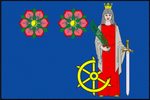 Česky: prapor obce Kateřinice